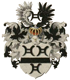 Blombergi suguvõsa aadlivapp